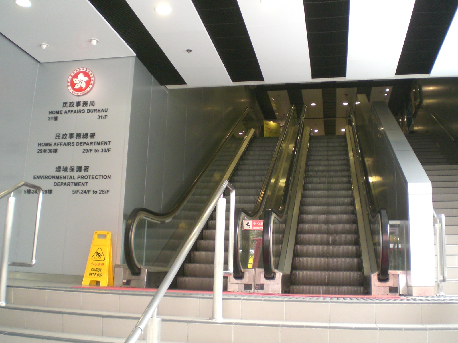 中文（香港）: 灣仔修頓中心